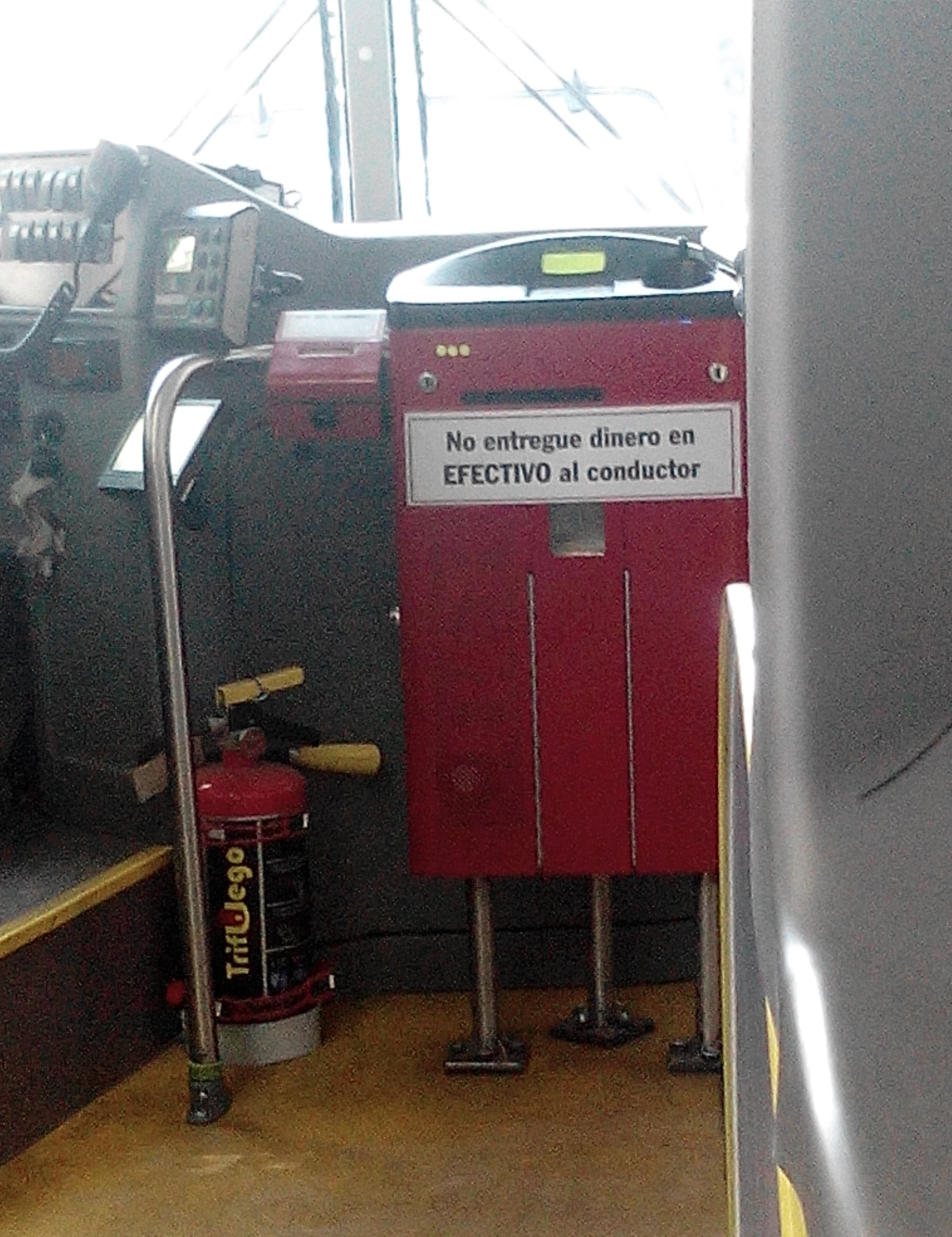 Alcancía para el peaje de usuarios dentro de un trolebús de la ciudad de Guadalajara